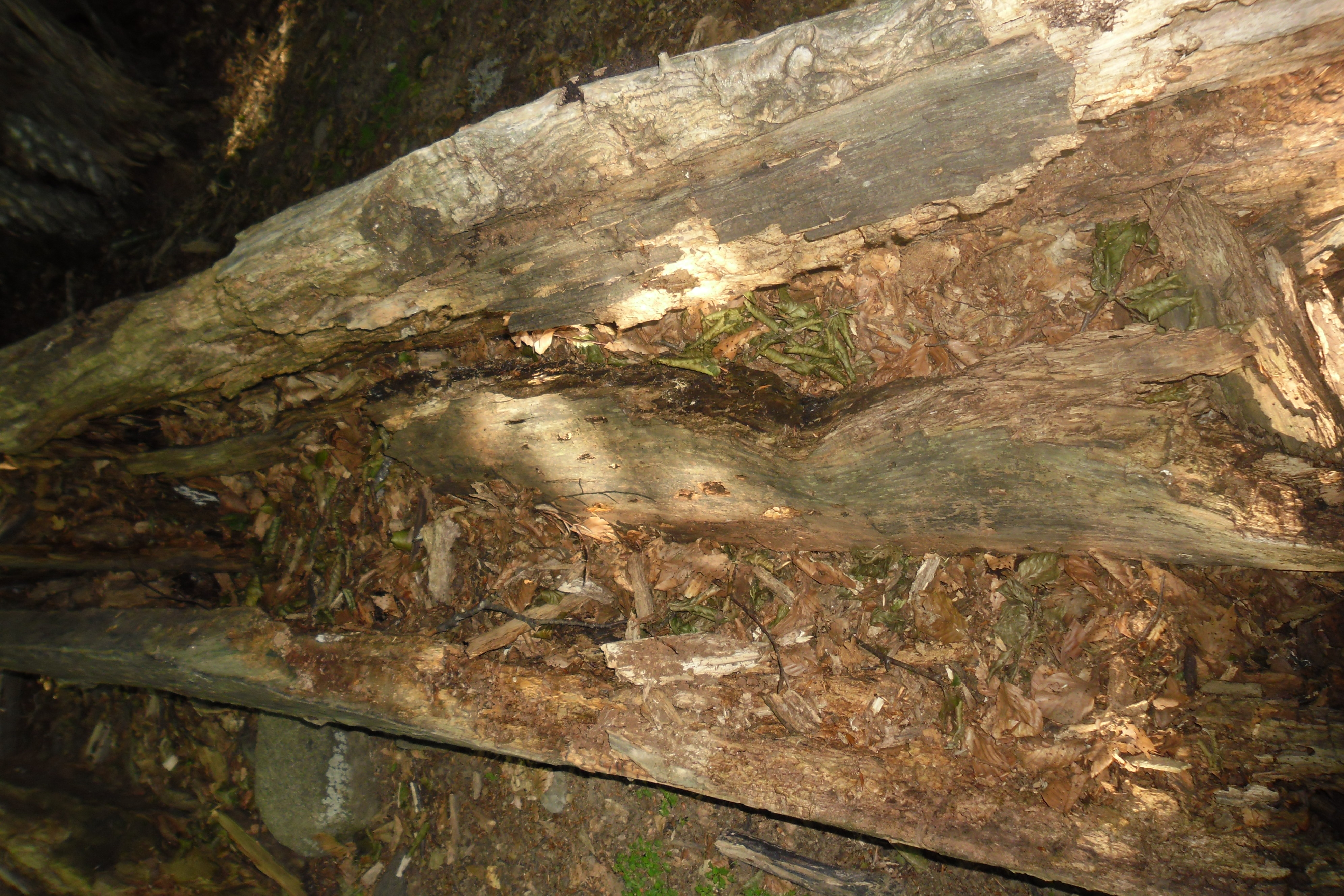 Фото